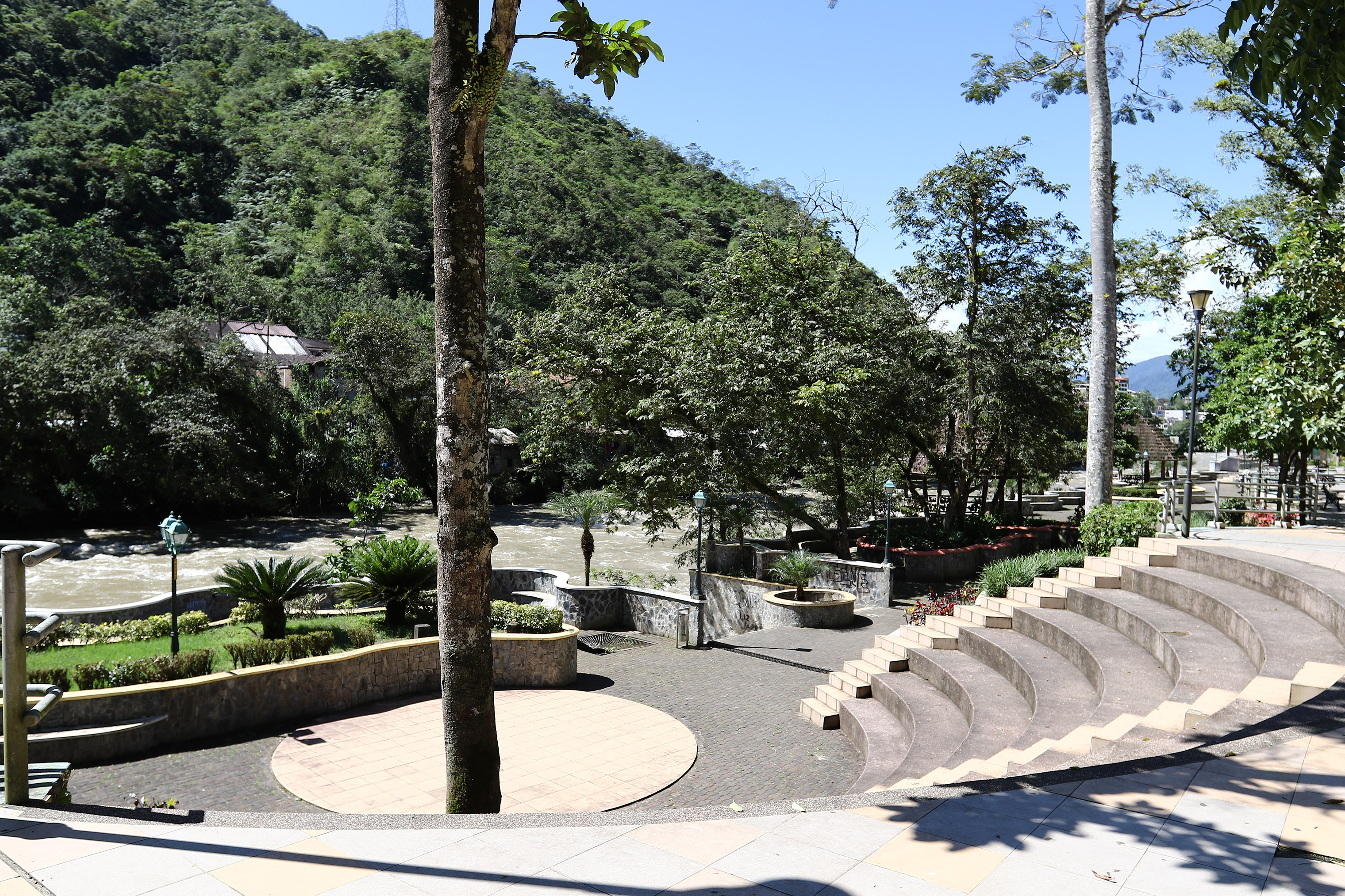 Zamora, Zamora Chinchipe 22 Jul (Andes).- El nuevo parque lineal en la ciudad de Zamora, una obra del gobierno central que disfrutan ciudadanos de la provincia y la ciudad. Fotografías: Carlos Rodríguez/Andes.